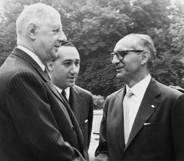 Charles de Gaulle de Francia con Arturo Frondizi presidente de Argentina.